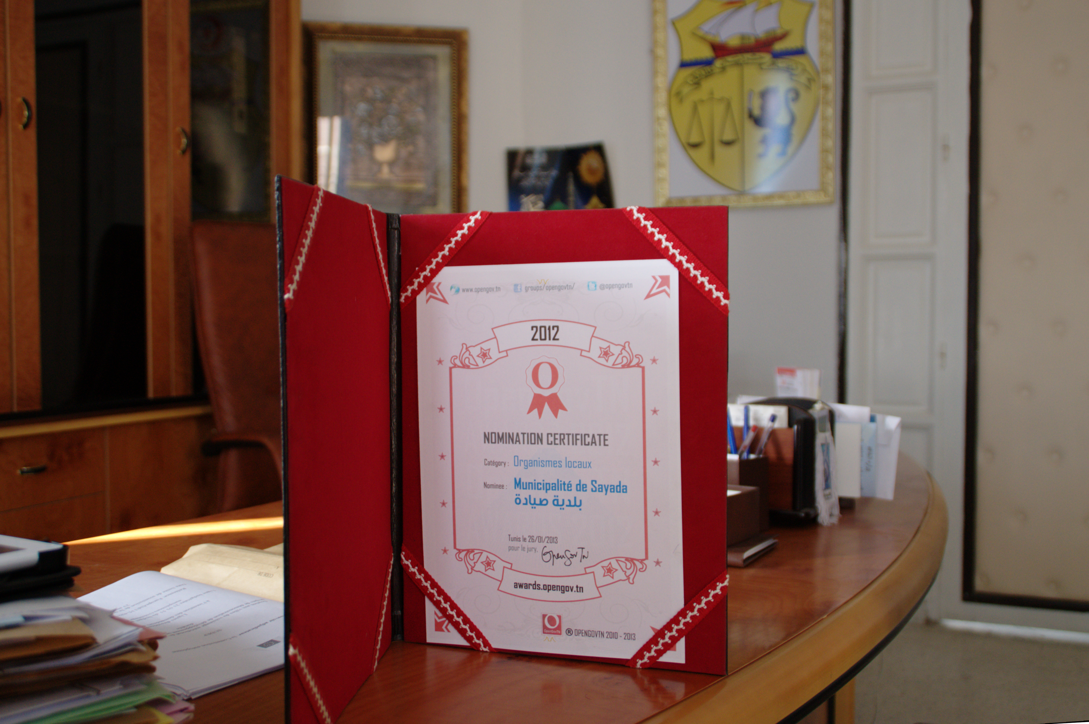 Certificat de l'OpenGov Award attribué à la délégation spéciale de Sayada pour l'année 2012.